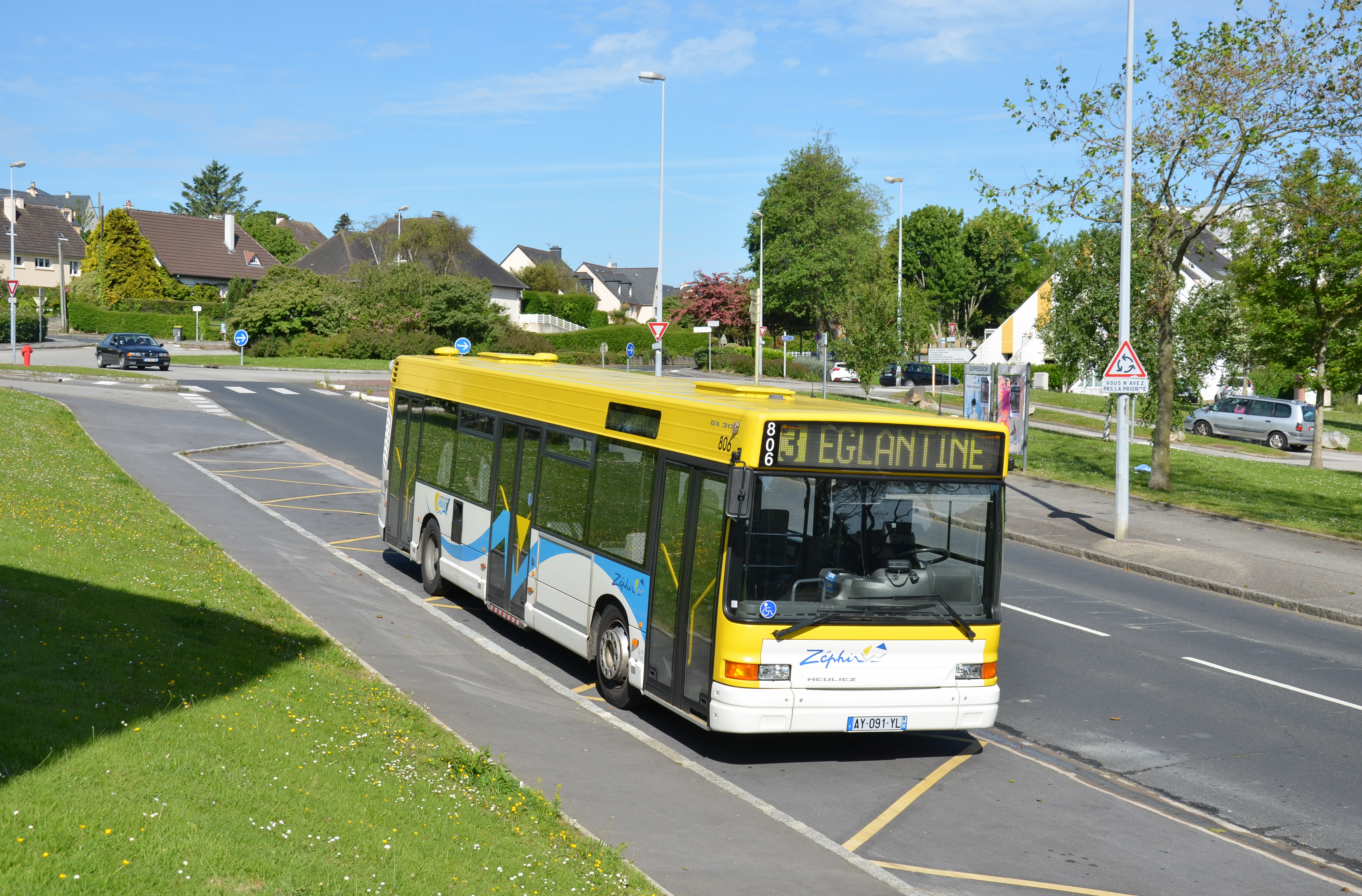 Heuliez GX 317 n°806 au terminus Brécourt de la ligne 3, sur le réseau Zéphir Bus de Cherbourg.